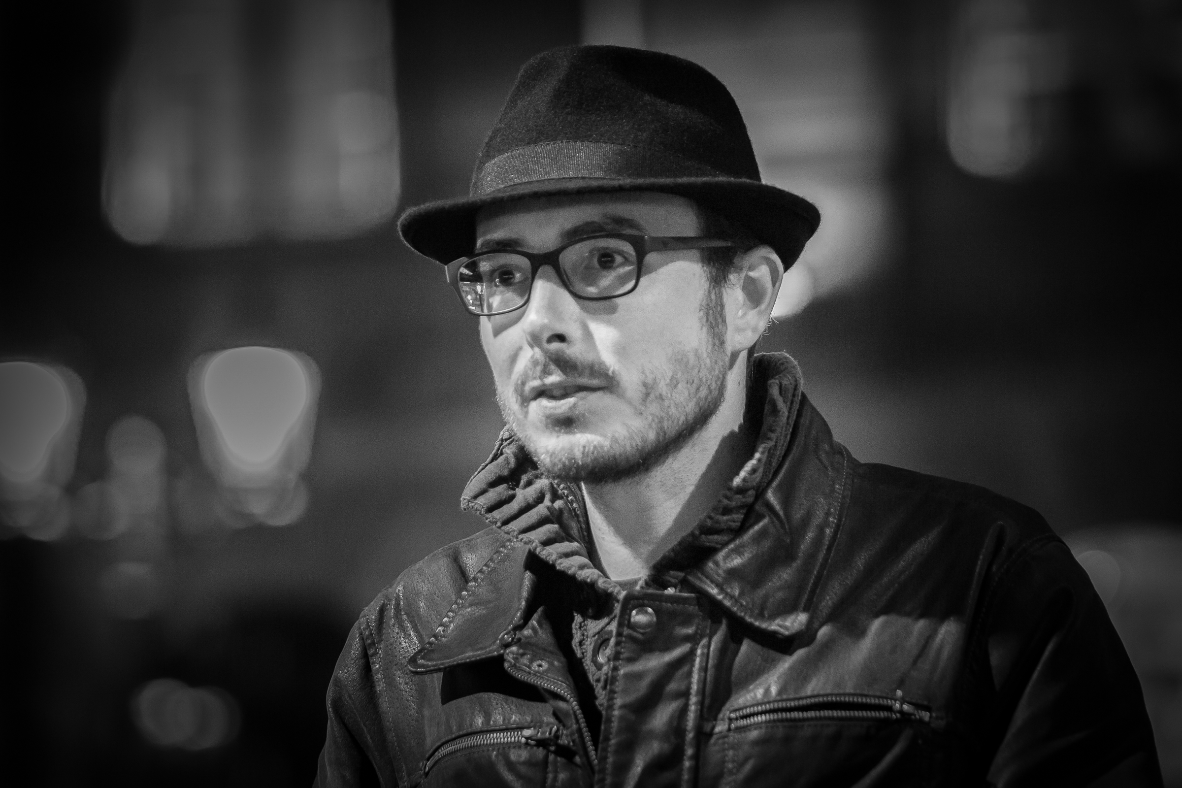 Antoine Deltour par Claude Truong-Ngoc